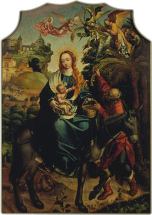 O retábulo "do Paraíso", assim designado uma vez que provém do altar-mor do extinto Convento do Paraíso em Lisboa, foi já objecto de alguns estudos que resultaram em opiniões diversas e divergentes no que toca à sua autoria. Num primeiro momento, o conjunto foi atribuído a Grão Vasco (Vasco Fernandes), por Taborda e Cirilo, opinião refutada por Raczynski que propôs o nome de Abram Prim (Primus). Carl Justi apontou como autor o pintor Velascus e Émile Bartaux dividiu a série em dois conjuntos, atribuindo a "Anunciação", a "Visitação" e a "Natividade" a Cristóvão de Figueiredo, e os restantes painéis ao "Mestre do Retábulo de Santiago". Foi, porém, José de Figueiredo quem reagropou novamente as oito pinturas e as enquadrou na obra do "Mestre do Paraíso", no que foi secundado por Reinaldo dos Santos. A Myron Malkiel-Jirmounsky, coube alertar para o facto de estarmos na presença de uma obra colectiva e não de um só pintor. Actualmente, e na esteira deste último historiador, ainda que se destaque o nome de Gregório Lopes na atribuição deste conjunto retabular, não há dúvida em se afirmar que se trata de uma obra de parceria, o que é desde logo visível na heterogeneidade pictórica e técnica das várias tábuas que o compõem.